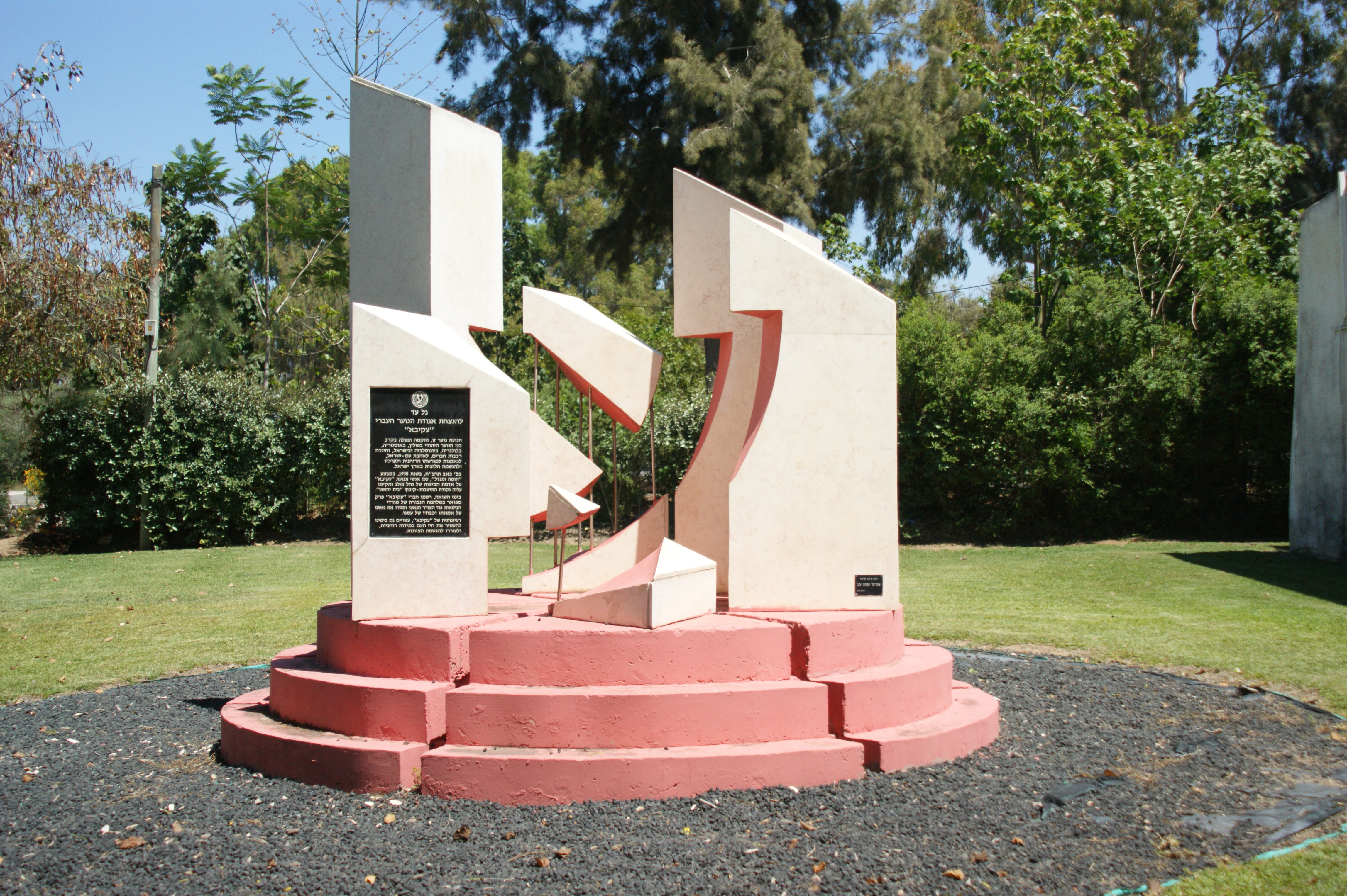 אנדרטת עקיבא בבית יהושוע